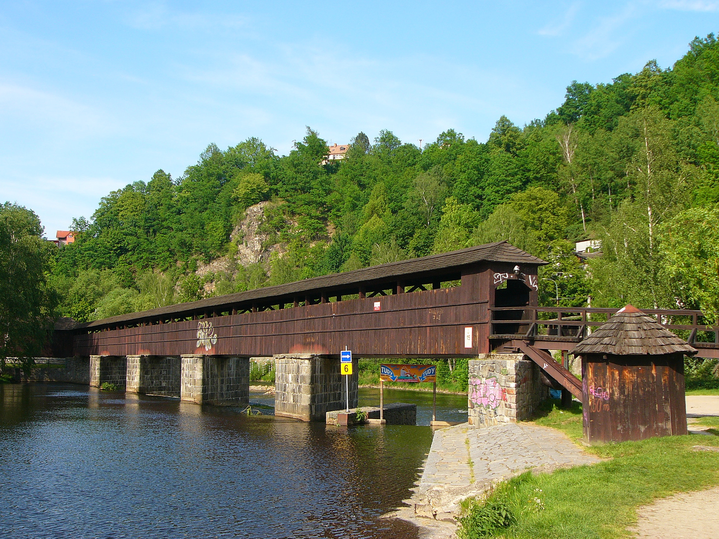 Lávka U rechlí, přes Vltavu, pp. 1347/1, ZSJ Plešivec a Nové Spolí, Český Krumlov.